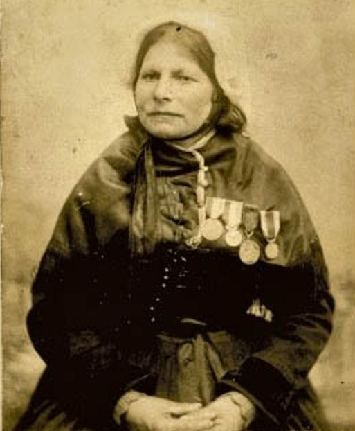 Rose Héré, habitante d'Ouessant, qui sauva 14 marins du cargo Vesper dans la nuit du 1 au 2 novembre 1903